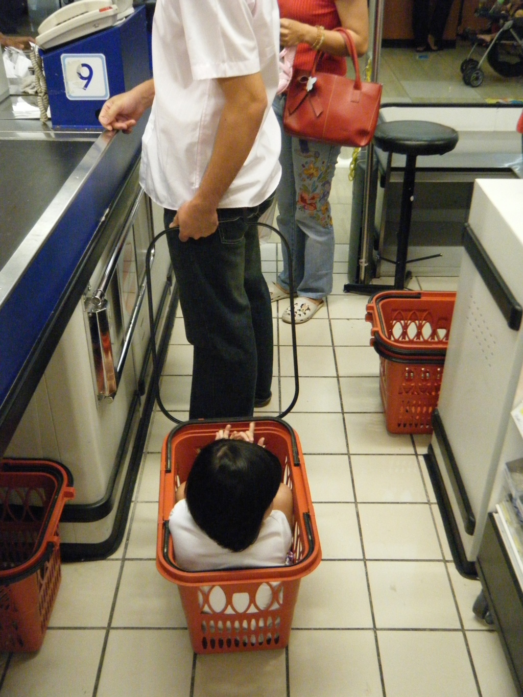 Melaka, Malaysia.